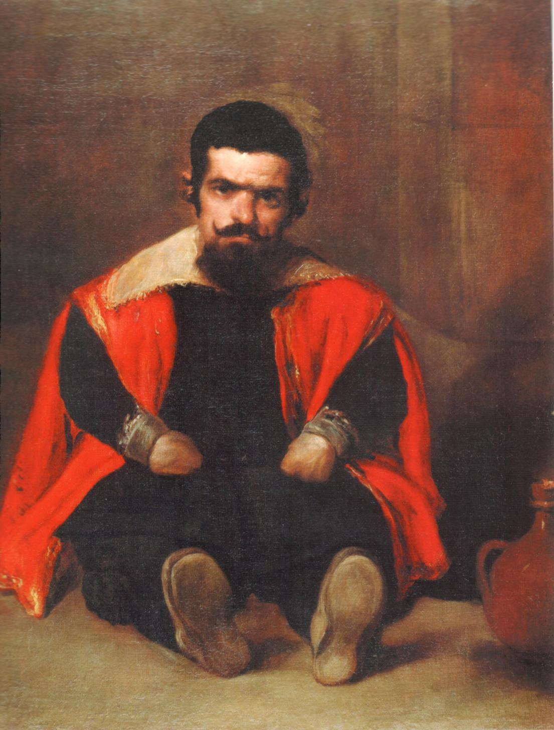 Velázquez: rèplica del retrat del bufó Sebastián de Morra, potser del mateix pintor. Suïssa, col. particular